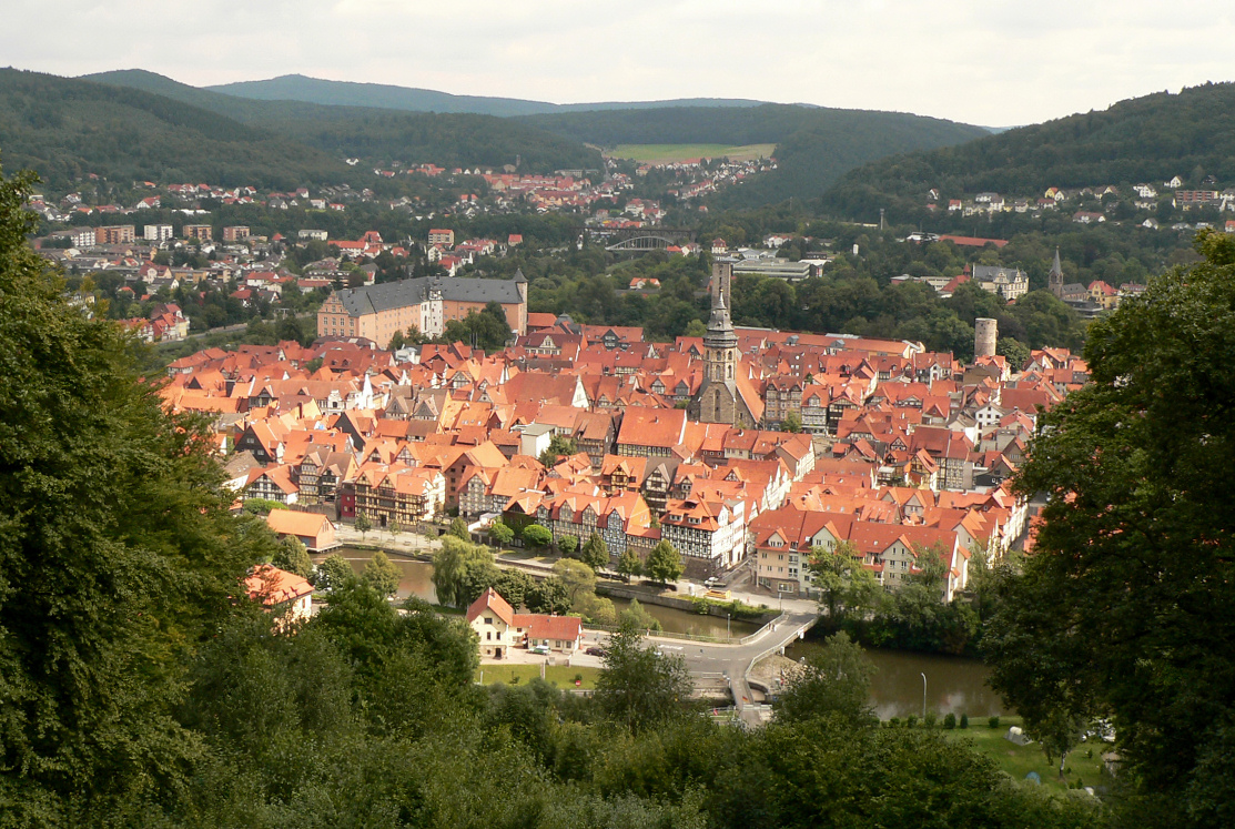 Blick von der Tillyschanze auf Münden, vorne die denkmalgeschützte Altstadt